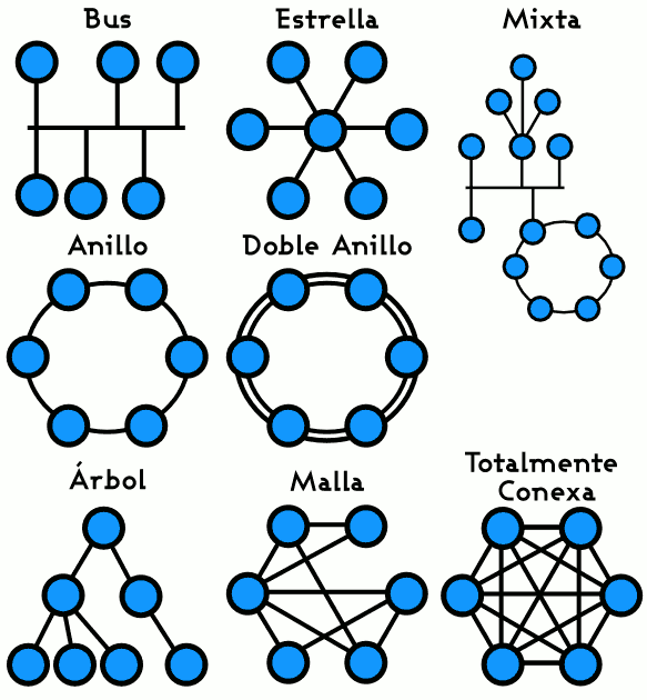 Topología comunes de red Creada con Inkscape y modificada con The Gimp. --Yearofthedragon 09:10 25 dic, 2004 (CET) Categoría:Informática